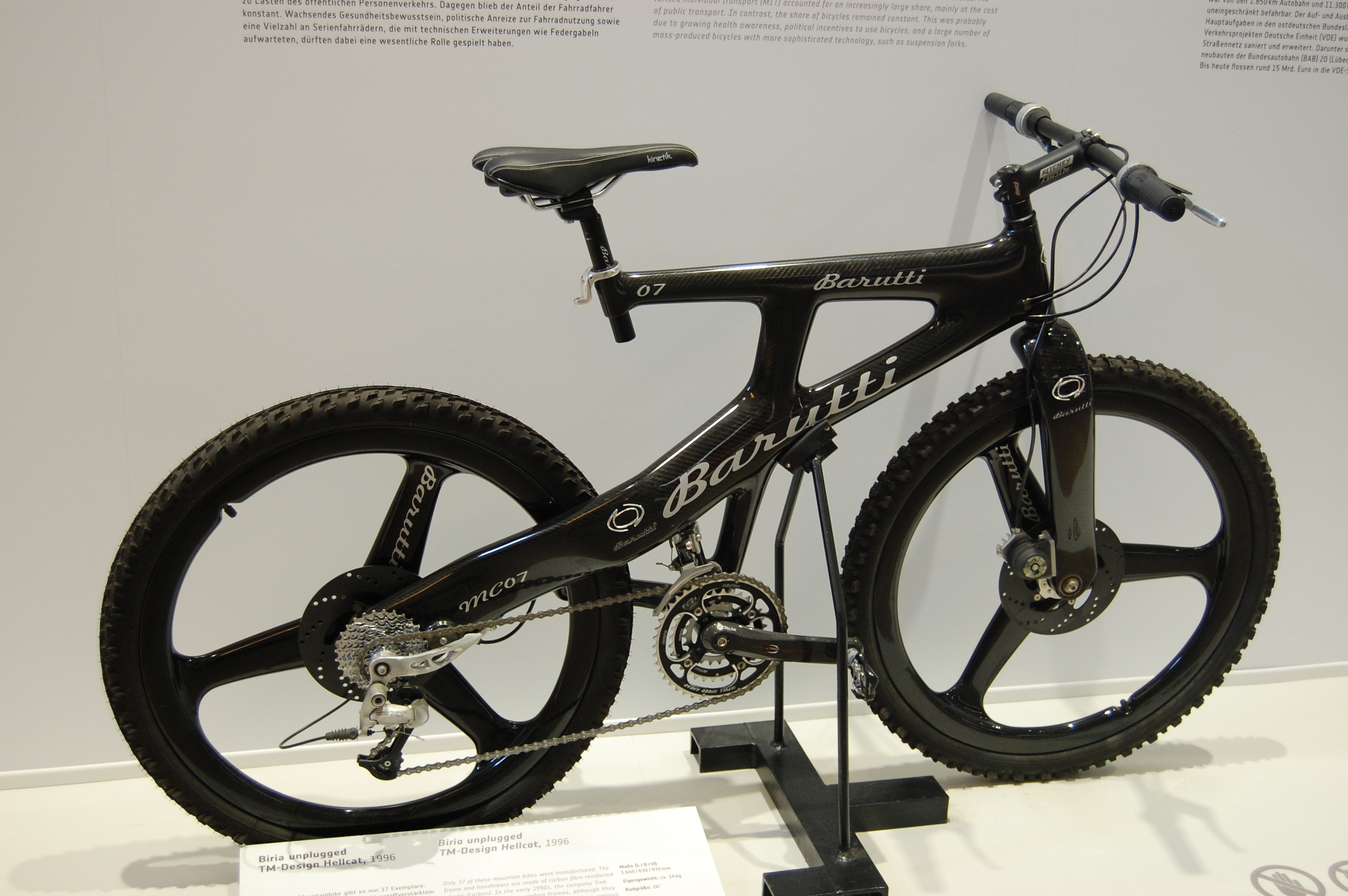 Dieses Exponat ist im Verkehrsmuseum Dresden zu sehen